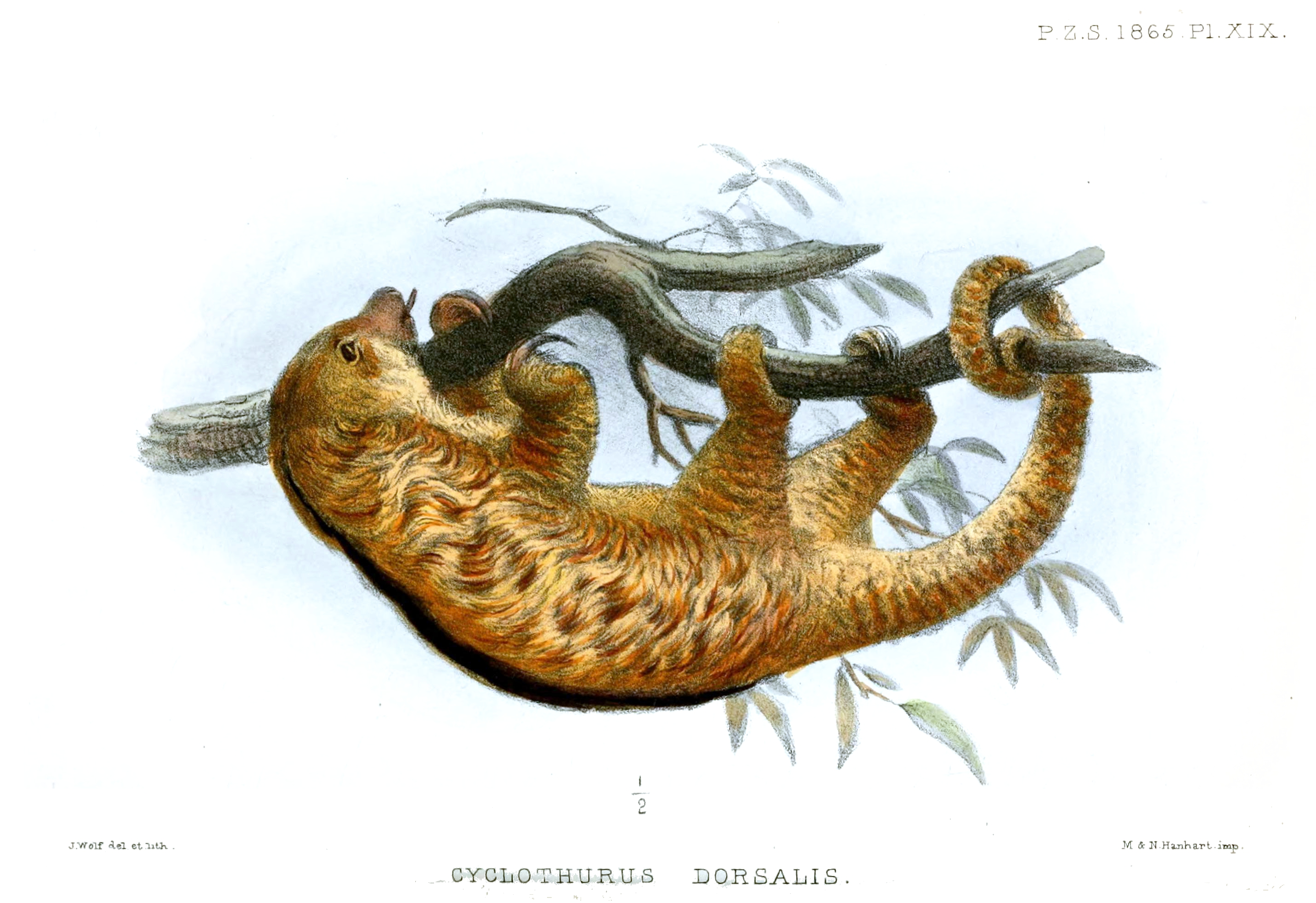 Cyclothurus dorsalis =Cyclopes didactylus dorsalis